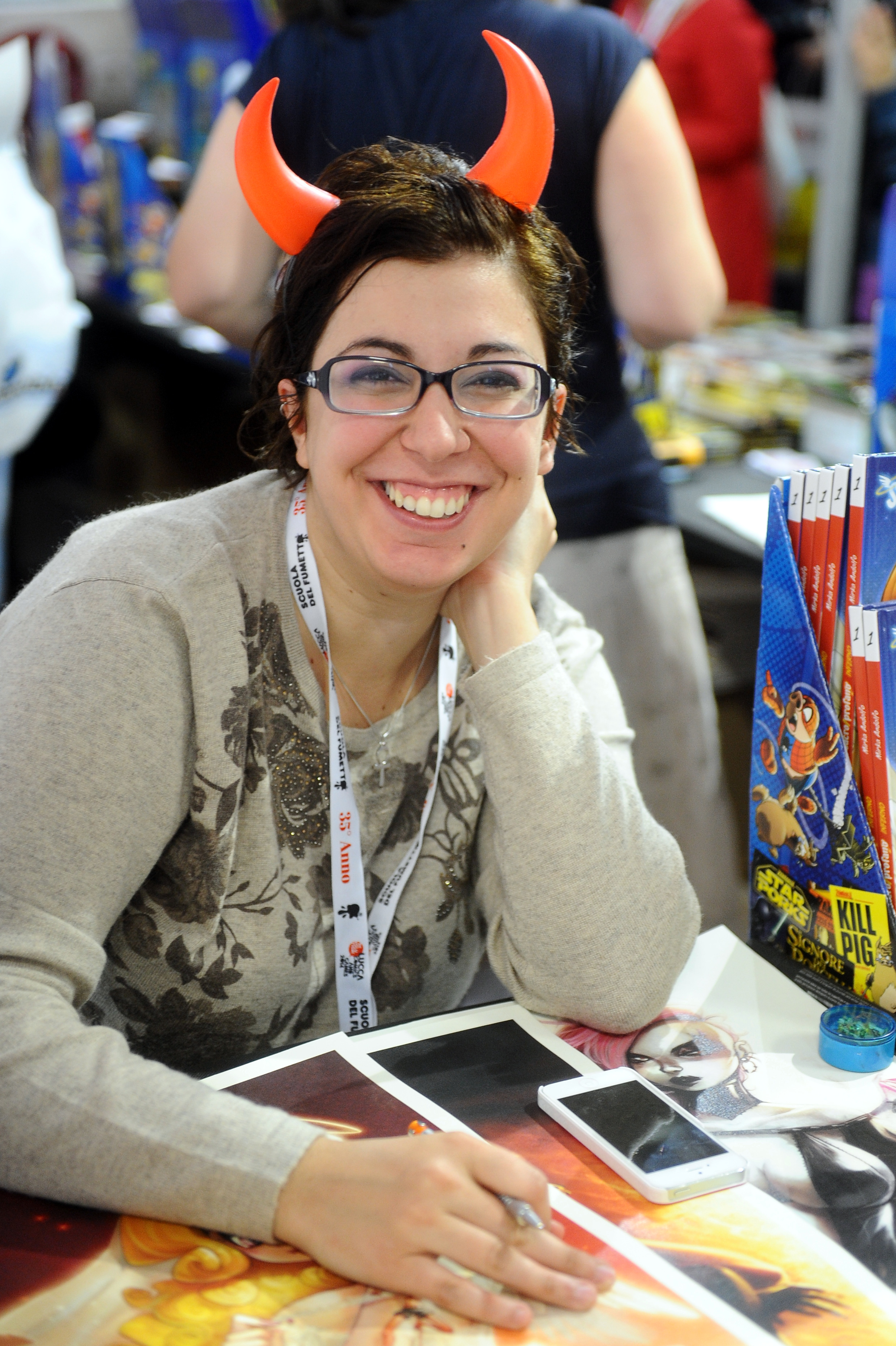 Mirka Andolfo a Lucca Comics & Games 2014.